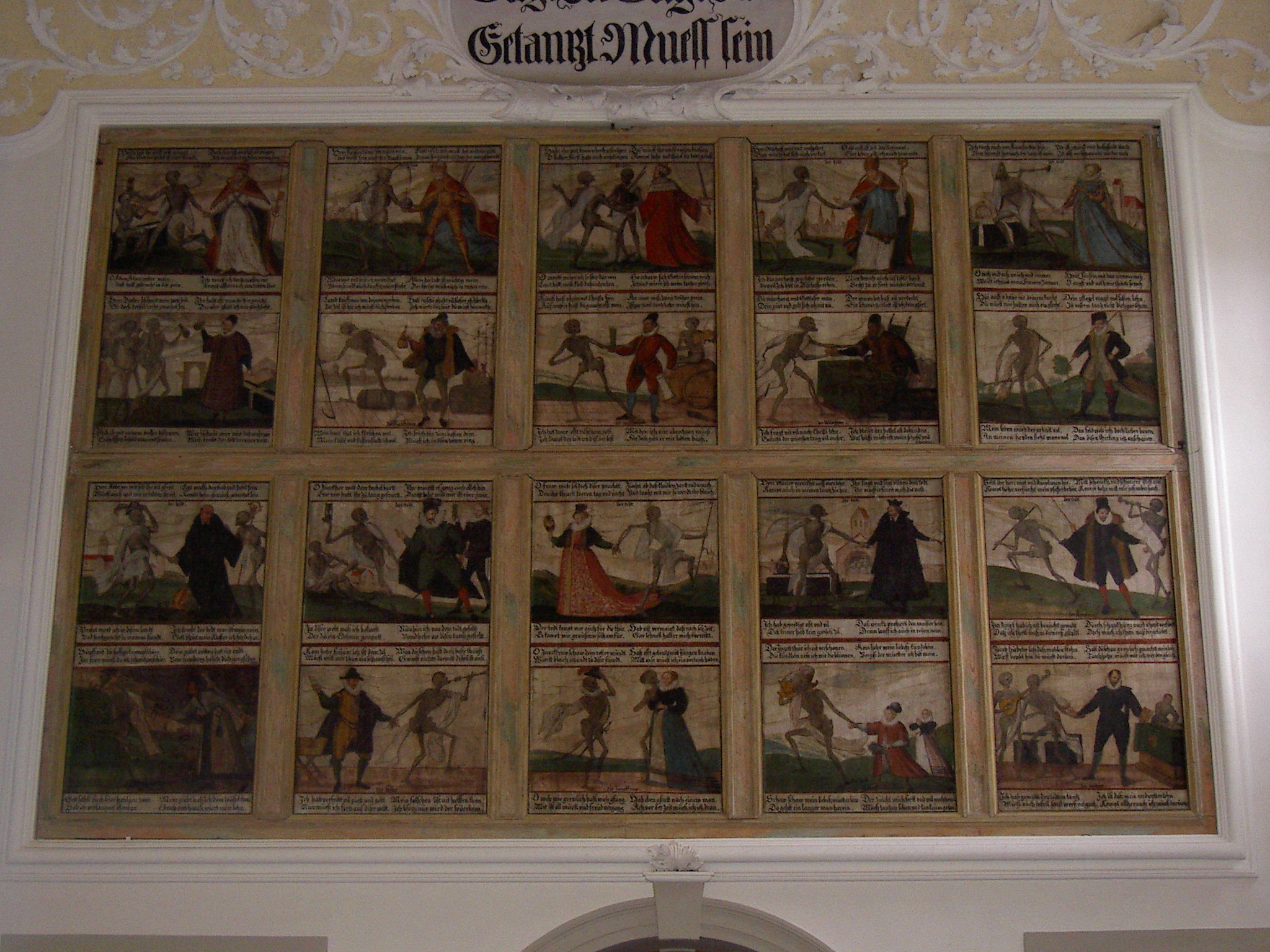 Füssener Totentanz von Jakob Hiebeler, vollendet 1602